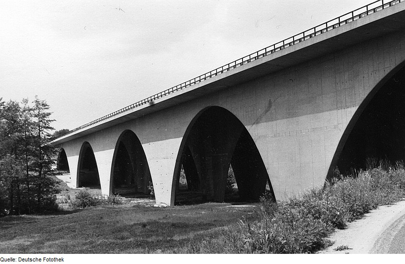 Original image description from the Deutsche FotothekWilsdruff. Autobahnbrücke über die Saubach